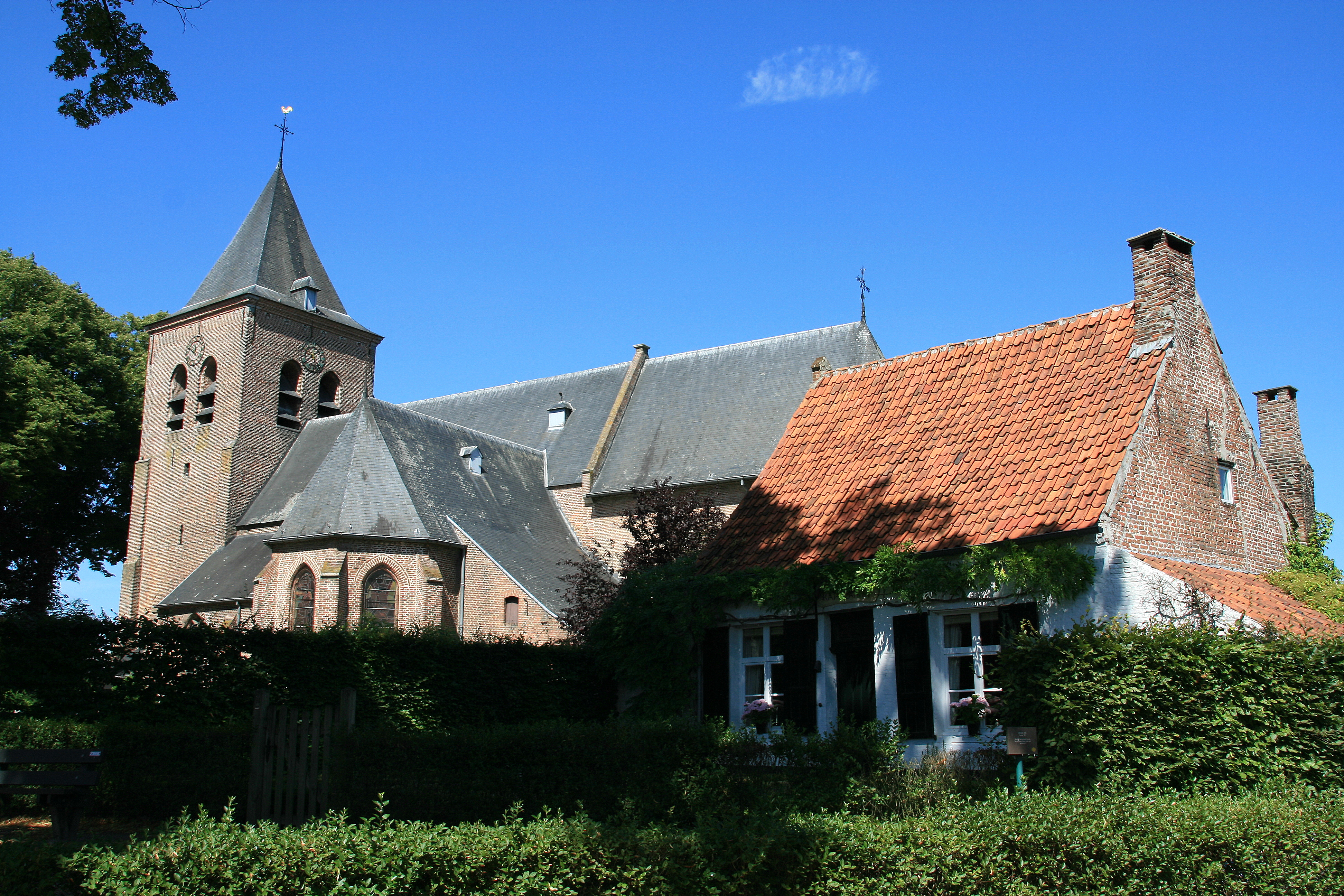 Sint Jan Baptistkerk - Dit sobere gotische dorpskerkje dateert uit de 15e eeuw, al kan het benedengedeelte van de kerk wel ouder zijn. De massieve toren heeft een vierkant grondvlak met zijden van 8 meter, een muurdikte van 1,2 meter en een hoogte van 35 meter.